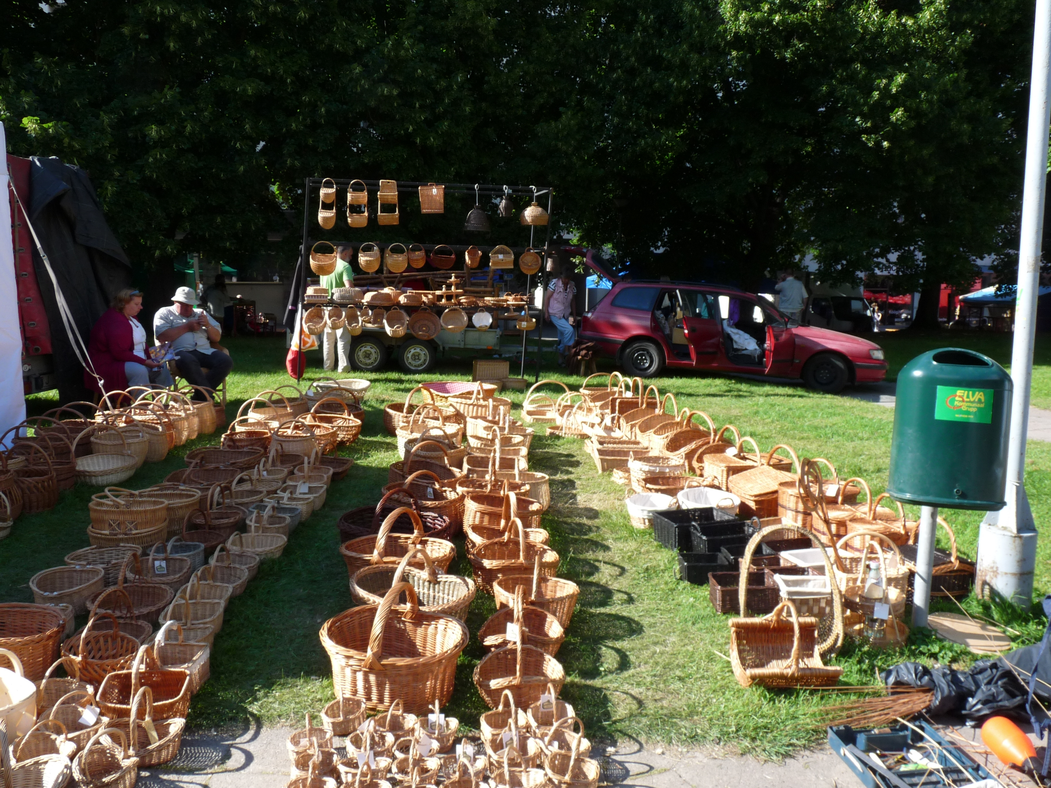 Korvilaadung kokkupakkimise eel Tartu keskpargis hansapäevadel, 22. juuli 2012. Foto: Oop.